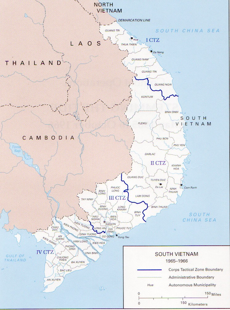 Zonale Einteilung des vietnamesischen Kriegsschauplatzes durch die US-Streitkräfte